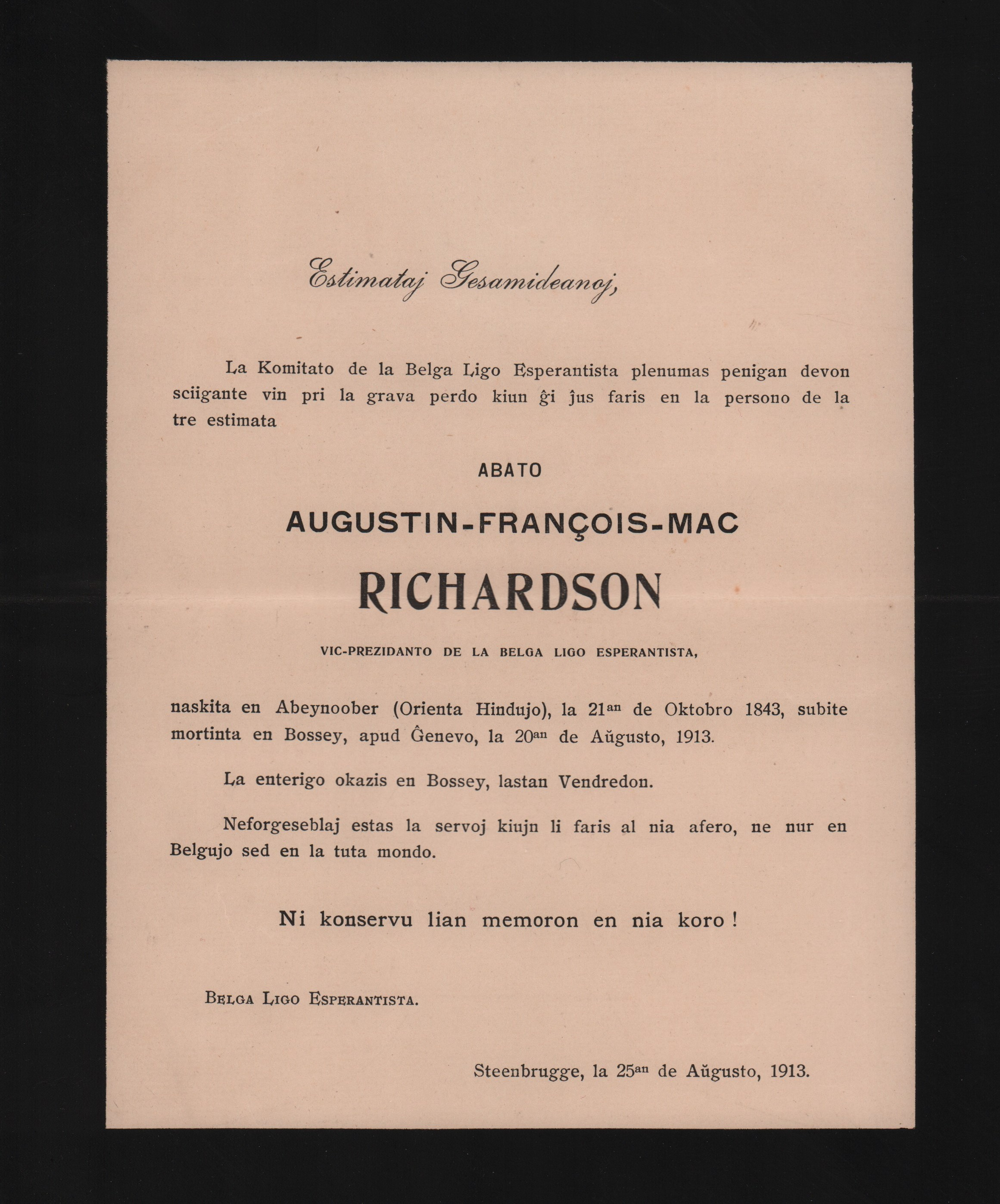 Mortanonco de abato Augustin Richardson, 25 aŭgusto 1913. La adreso sube estas de A.J. Witteryck, prezidanto de Belga Ligo Esperantista.